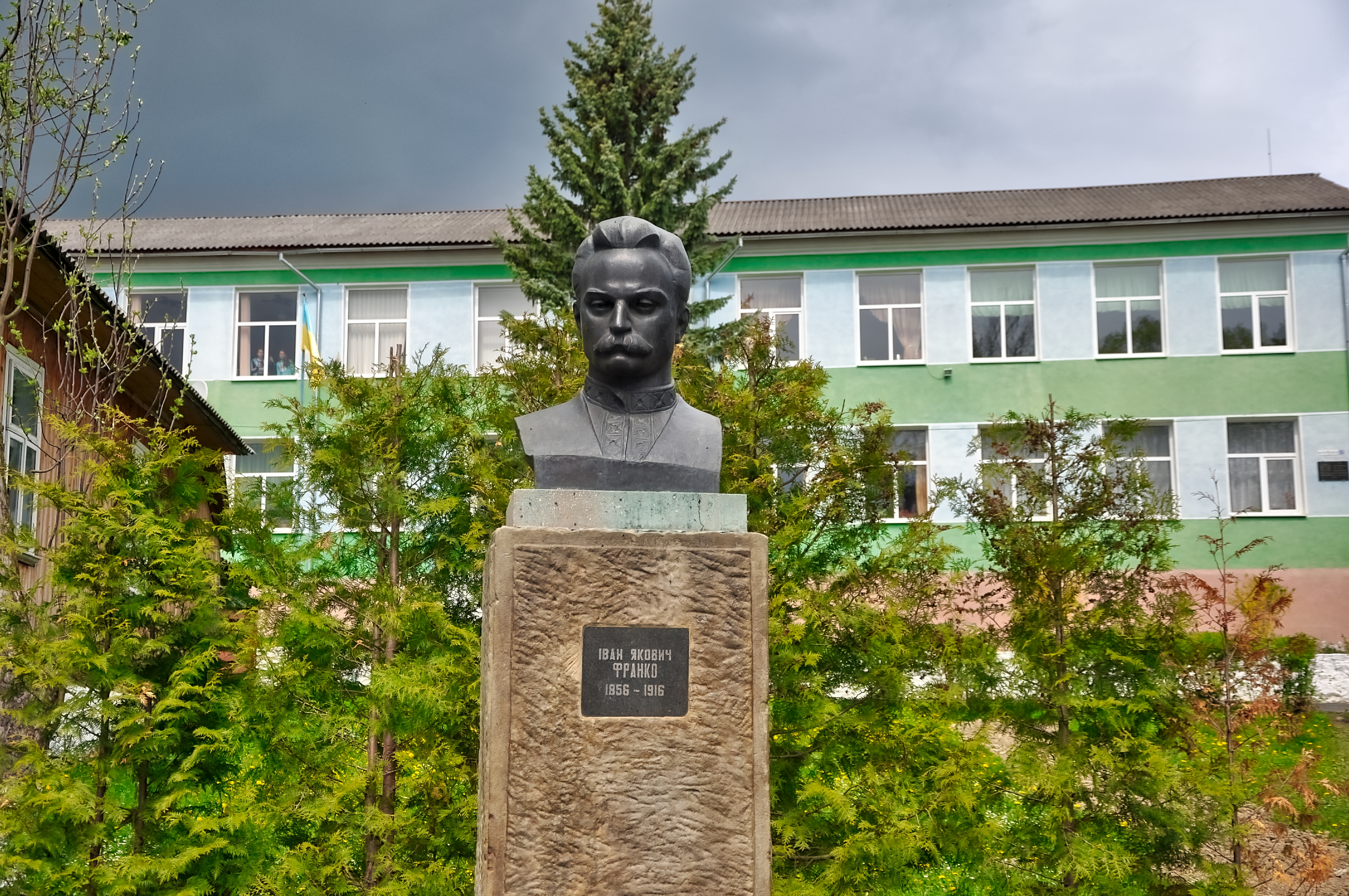 Погруддя І. Франку, Лолин